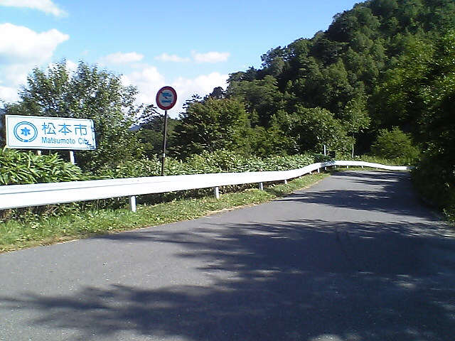 長野県道・岐阜県道39号奈川野麦高根線